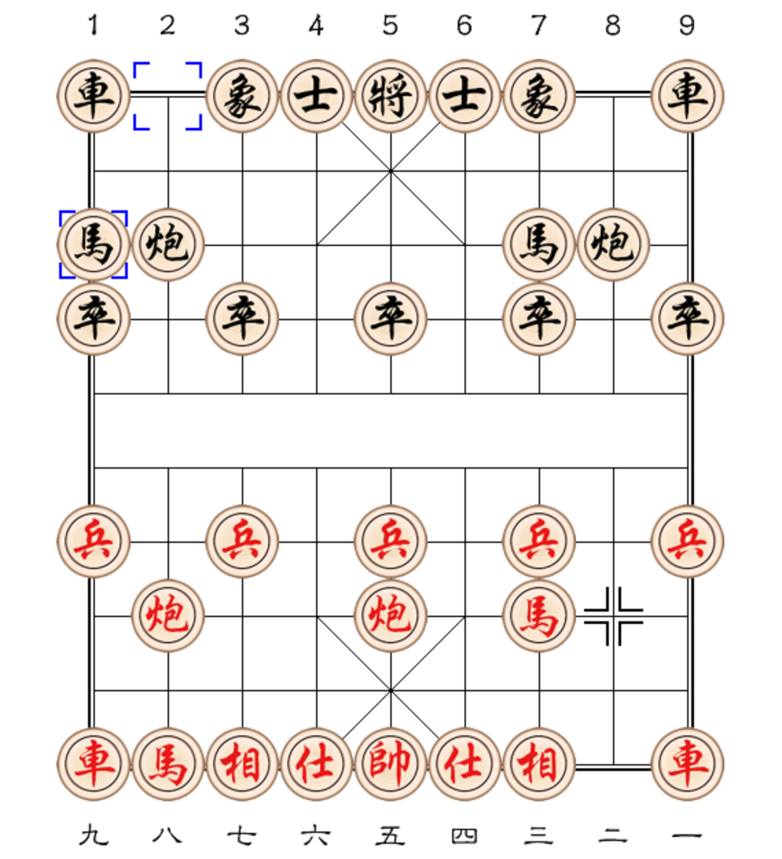 Hữu đơn đề